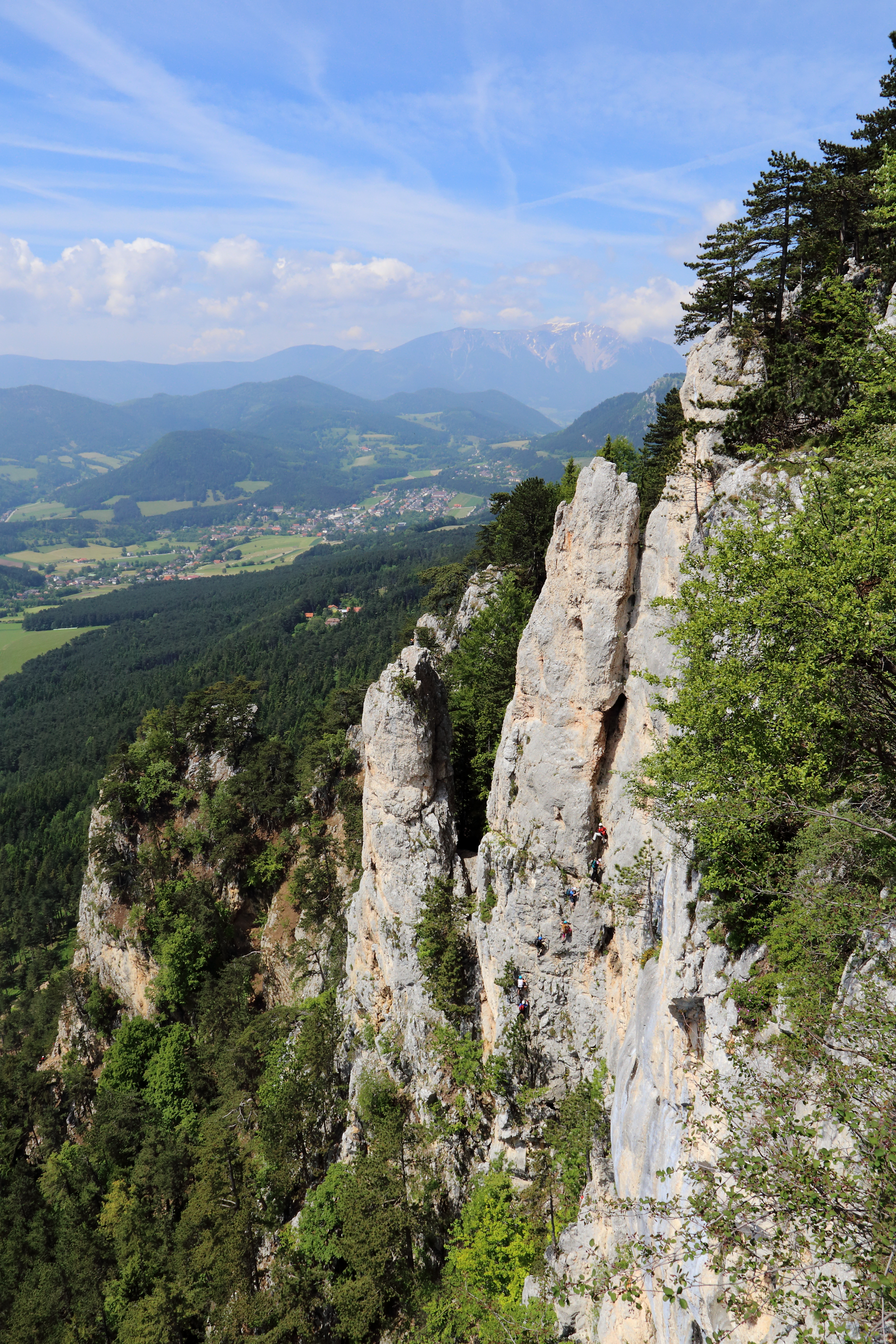 Die Hohe Wand Richtung Westen im Bereich zwischen dem Hubertushaus und der Großen Kanzel. Im Vordergrund links der Weningerturm, über den der 2013 eröffnete Gebirgsvereinssteig führt (einer der längster Klettersteige der Hohen Wand und erster im östlichen Niederösterreichs mit einer Seilbrücke). Etwas links der Bildmitte der Baumgartnerturm, rechts davon der Wildenauerturm, der durch den klassischen Wildenauersteig (1919 eröffnet) erschlossen ist und ganz rechts die Hochfallwand. Im Hintergrund Grünbach am Schneeberg und wiederum dahinter der noch leicht schneebedeckte Schneeberg, Niederösterreichs höchster Berg.